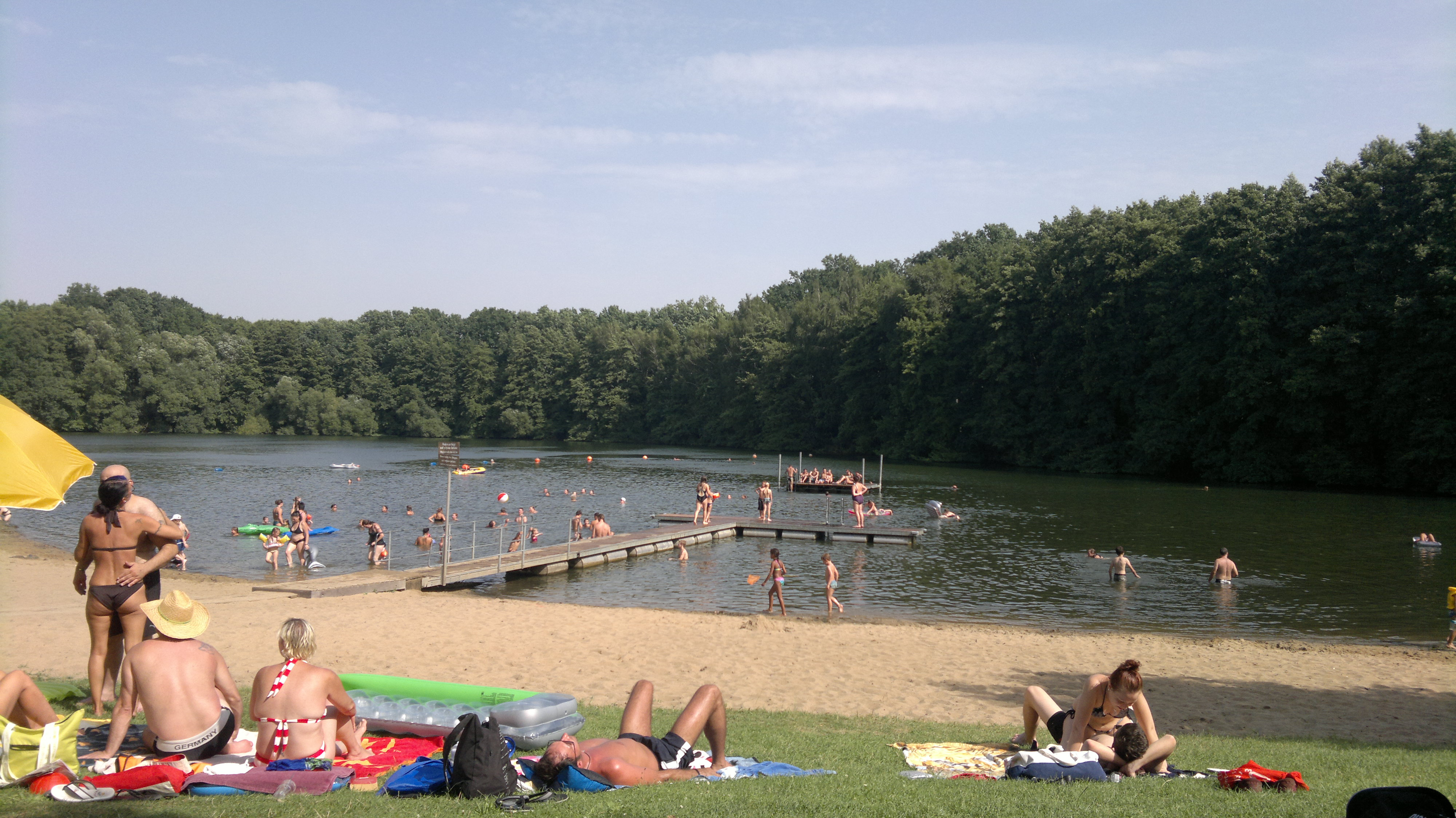 Grafenrheinfeld, Germany